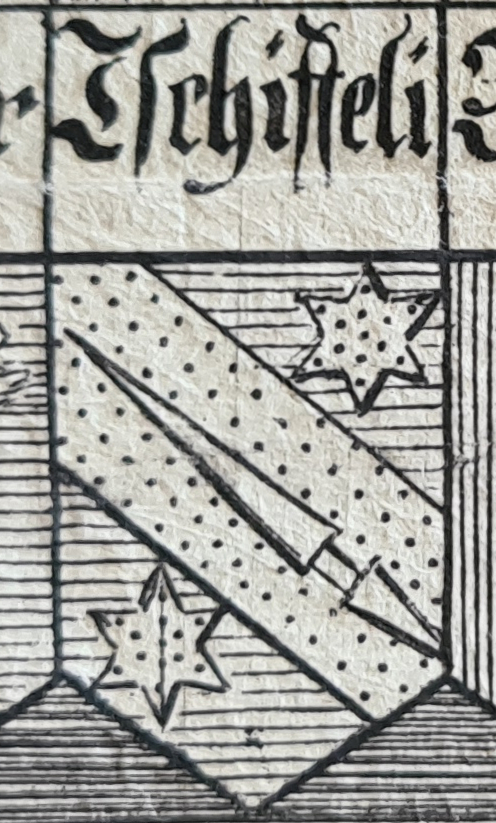 Wappen Tschiffeli 1748